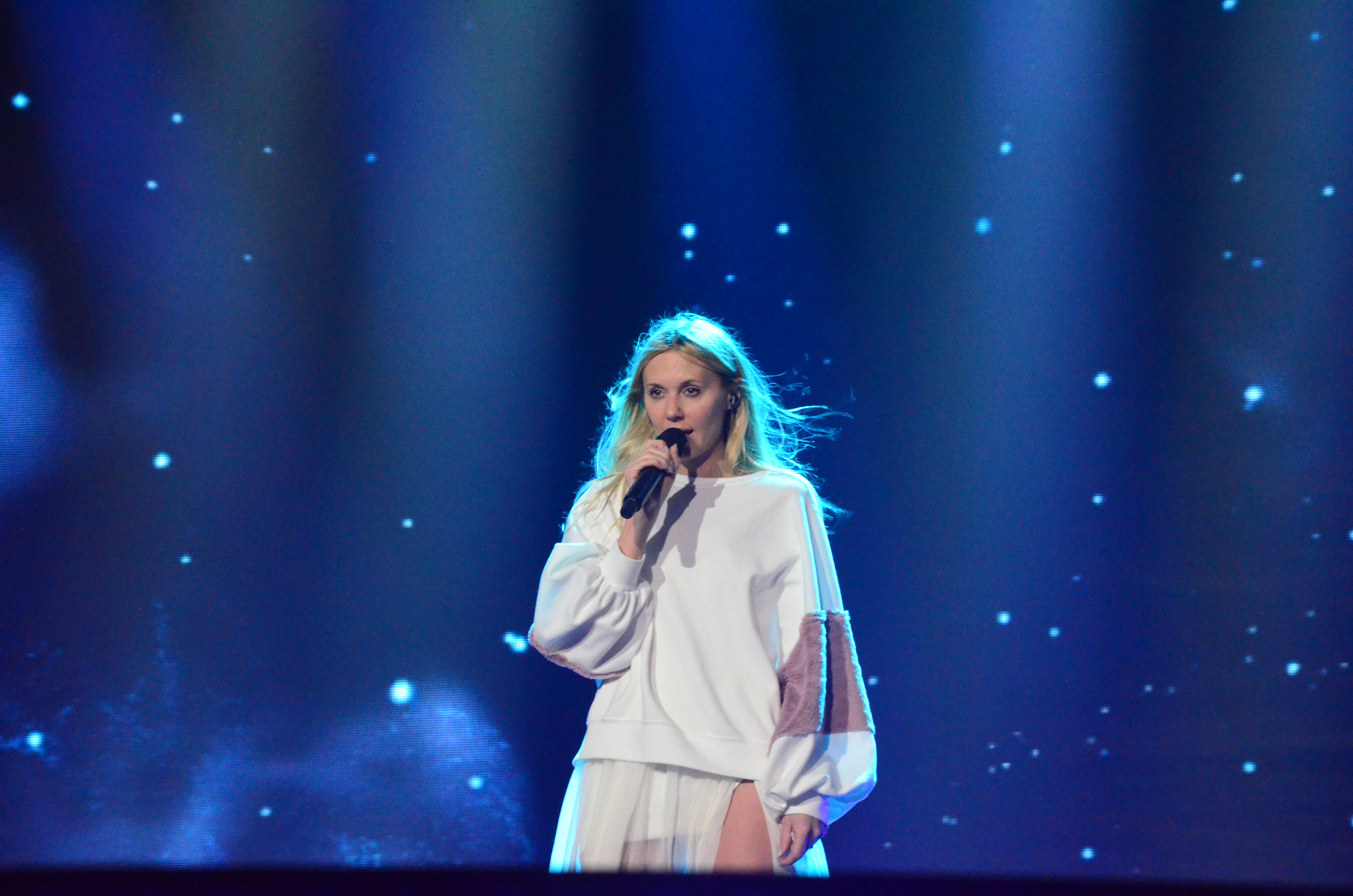 12 травня. Генеральна репетиція фіналу Євробачення 2017. Kasia Moś (Poland).